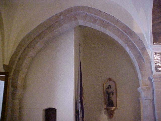 Arco gótico del interior de la iglesia parroquial de Benafigos